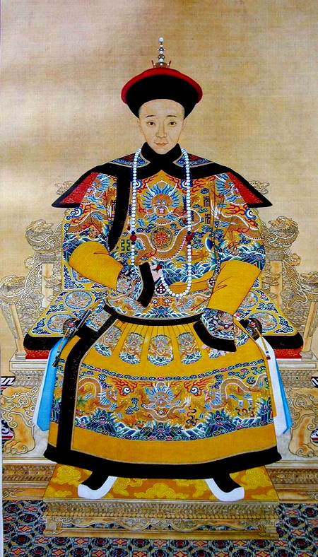 Emperor Xian Feng